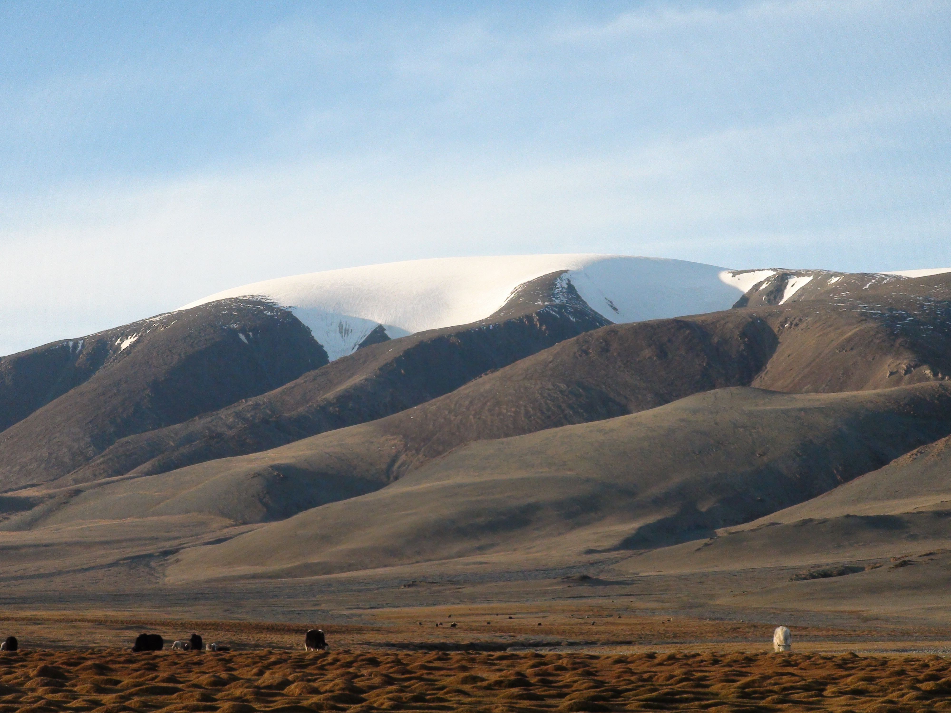 Sutai Mount, Altai Mountains.